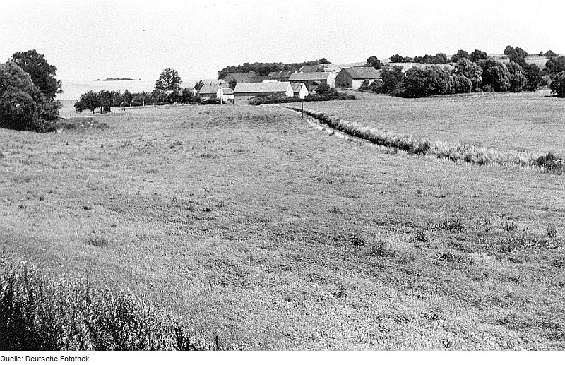 Original image description from the Deutsche Fotothek Göda-Muschelwitz. Blick auf Muschelwitz